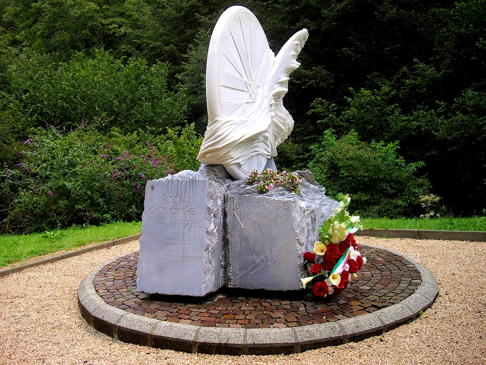 Monument à la mémoire du coureur cycliste italien Fabio Casartelli mort dans la descente du col de Portet d'Aspet durant le tour de France 1995.